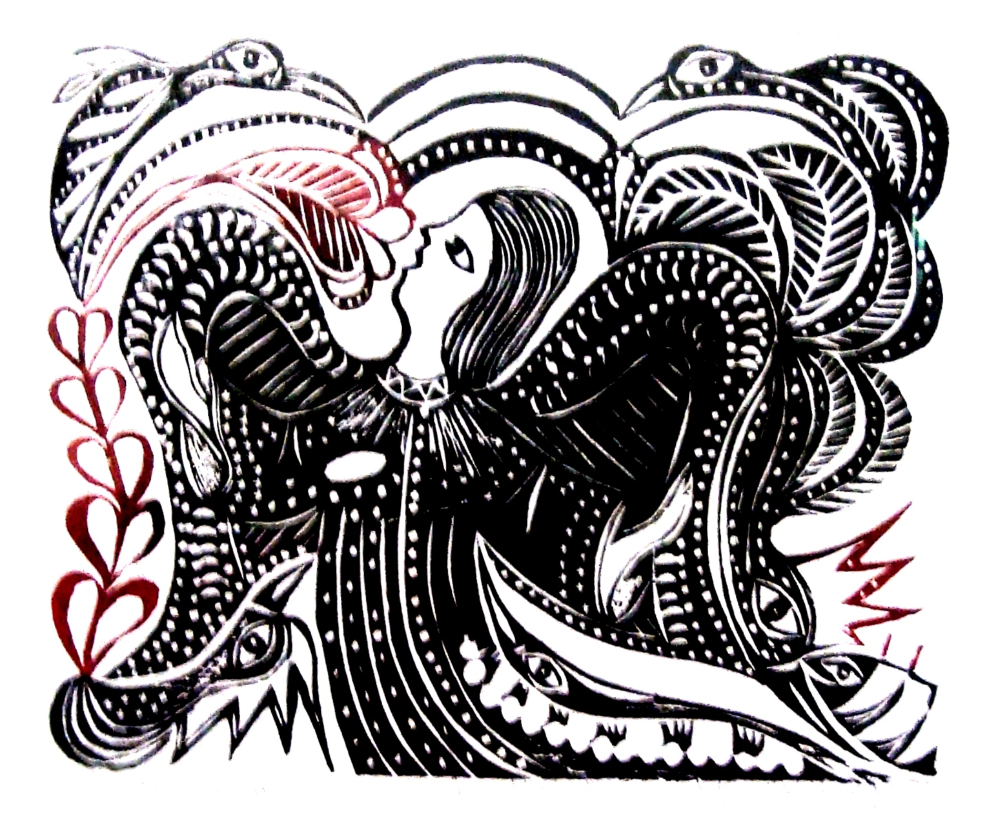 Xilogravura da Artista plástica Yolanda Carvalho